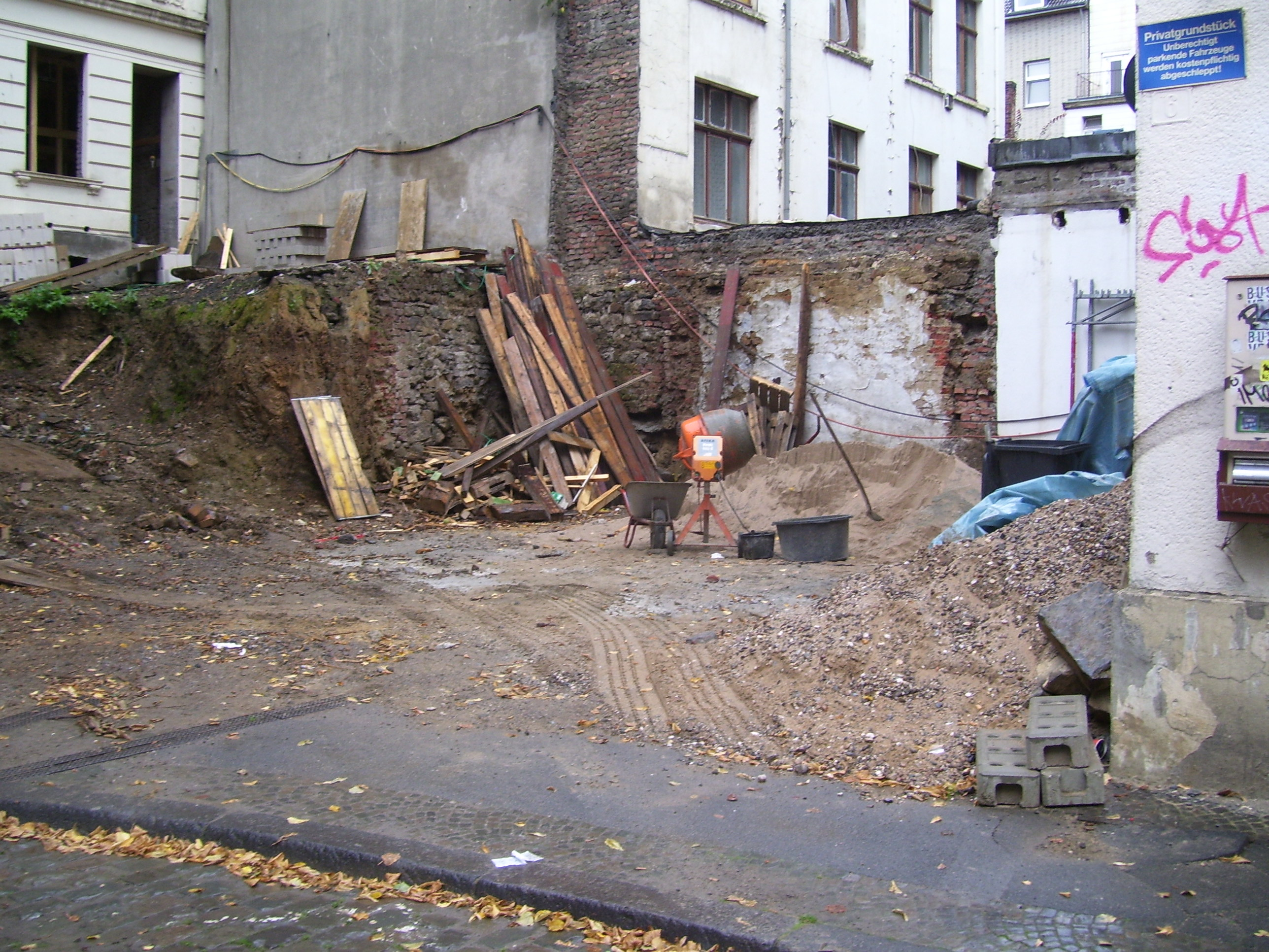 Auf diesem Gelände stand das ehemalige Baudenkmal Neue Friedrichstraße 6a in Wuppertal.